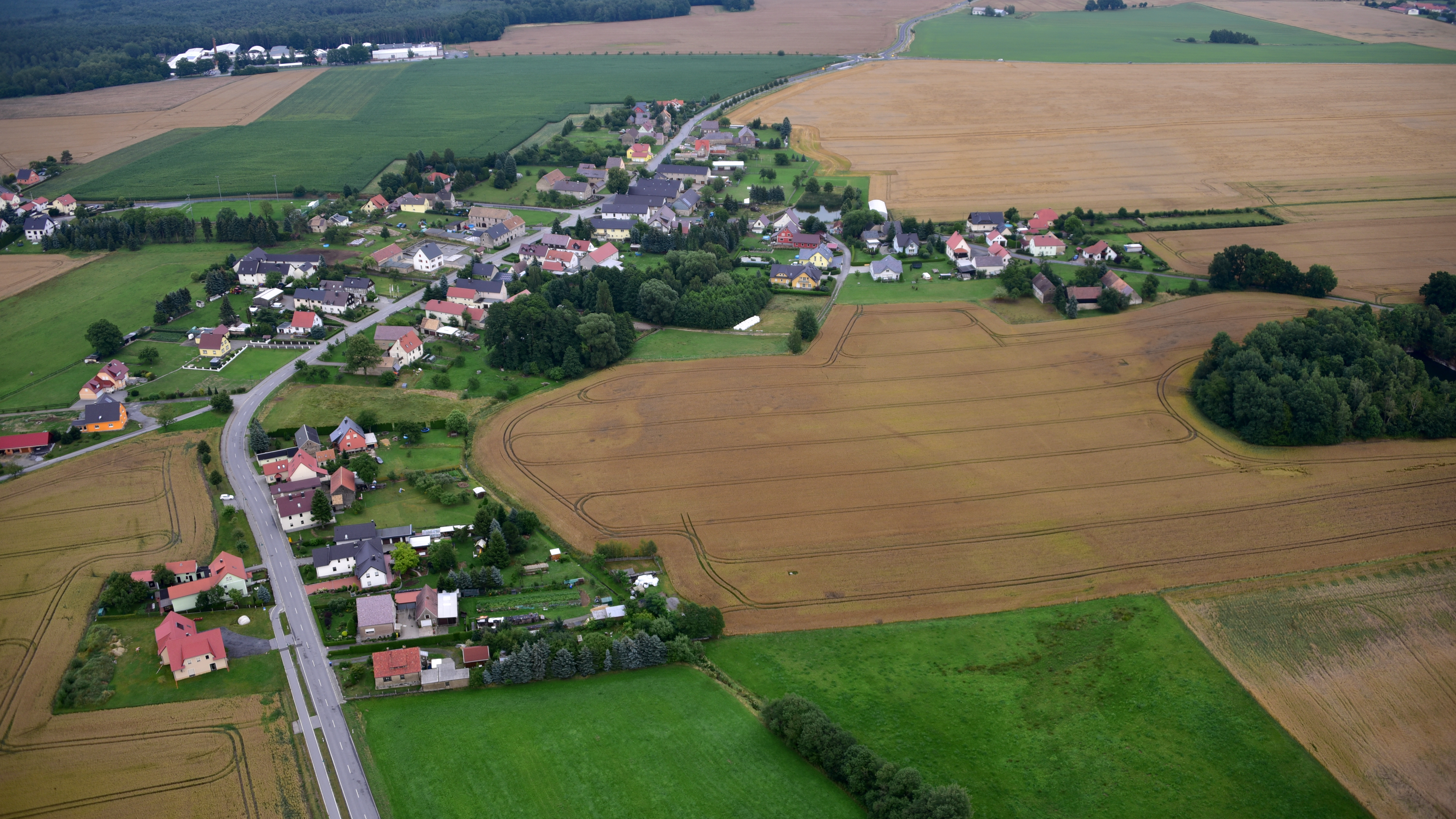 Wendischbaselitz, Luftaufnahme (2017) Hornjoserbsce: Powětrowy wobraz Serbskich Pazlic (2017)